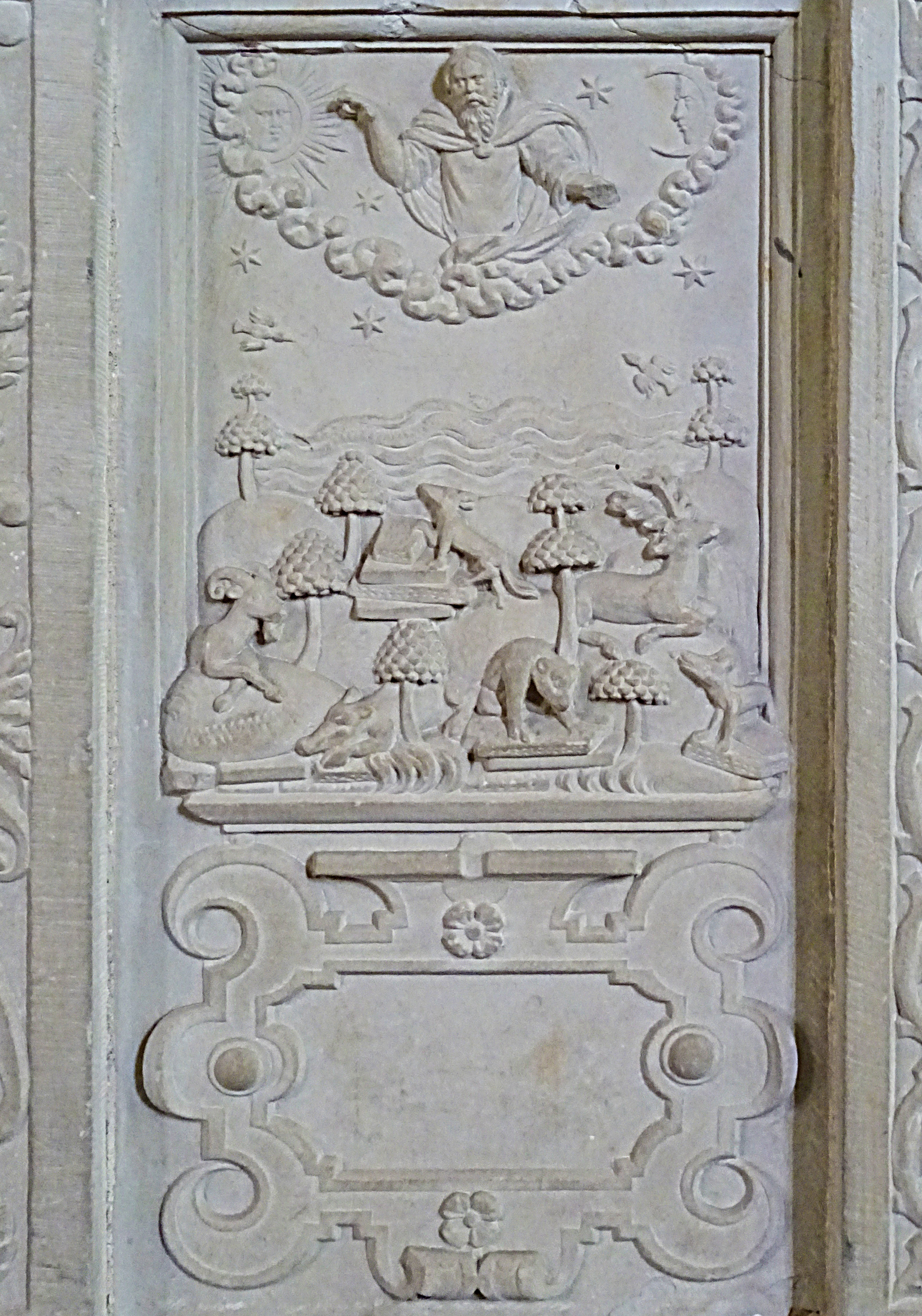 Steinbilderbibel in der St. Annenkirche (Eisleben), 03/29, Erschaffung der Welt